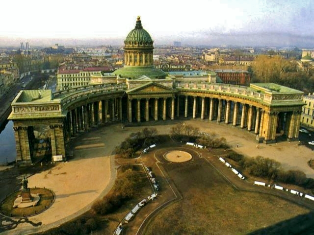 Panoramica della Cattedrale di Kazan' a San Pietroburgo